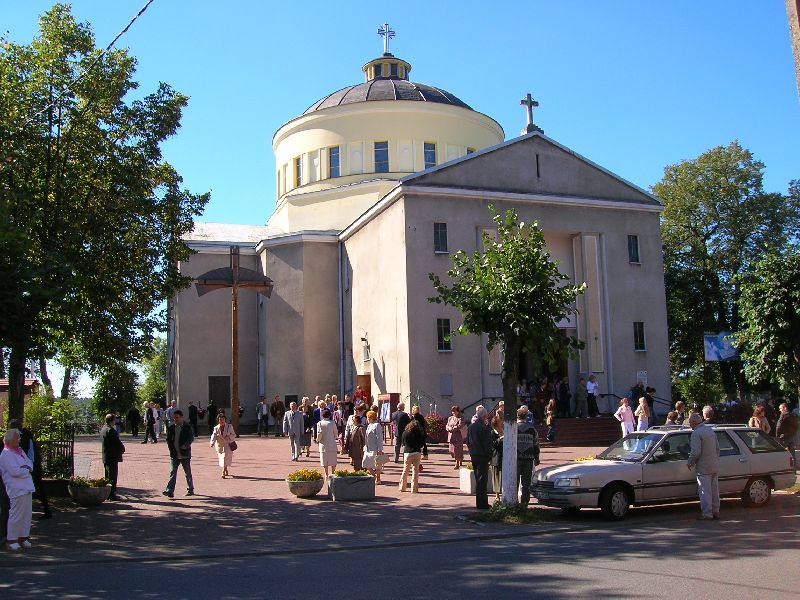 Kościół Świętego Jakuba w Głownie.